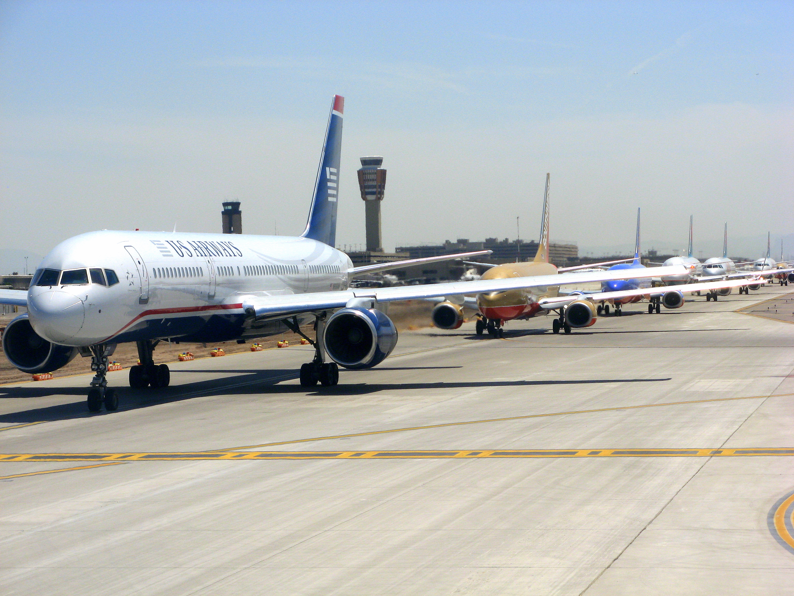 Airliners queued for departure at PHX